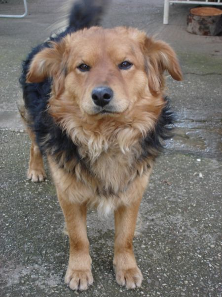 Aris 2005-2019, Tony Esopi dog